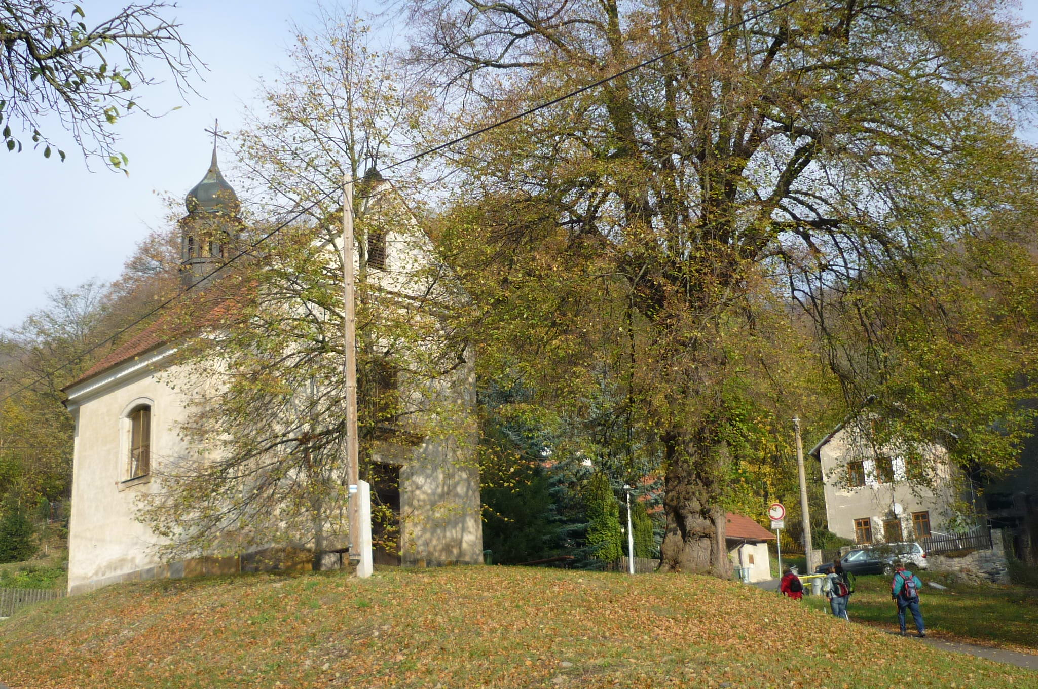 Kapelle unterhalb der Riesenburg bei Ossegg in Nordböhmen